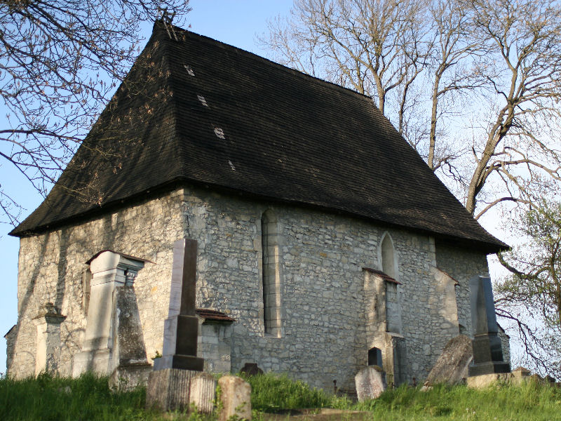 Biserica reformată din Aghireşu-Fabrici/ Băgara